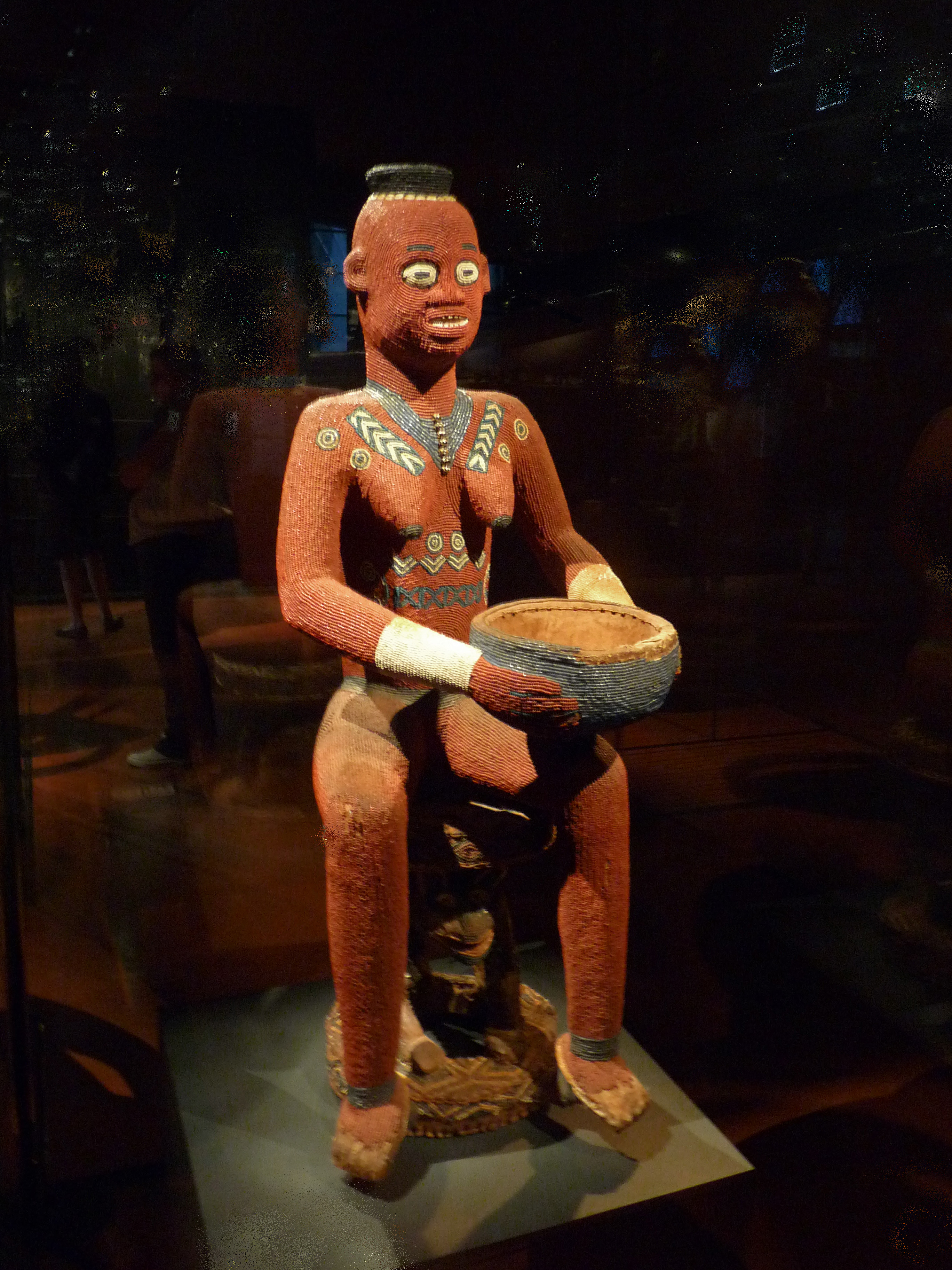 Reine porteuse de coupe, population Bamiléké, Cameroun, province de l'ouest, chefferie de Bansoa, 19e siècle. Bois, perles de verre, textiles, cauris. Musée du quai Branly.